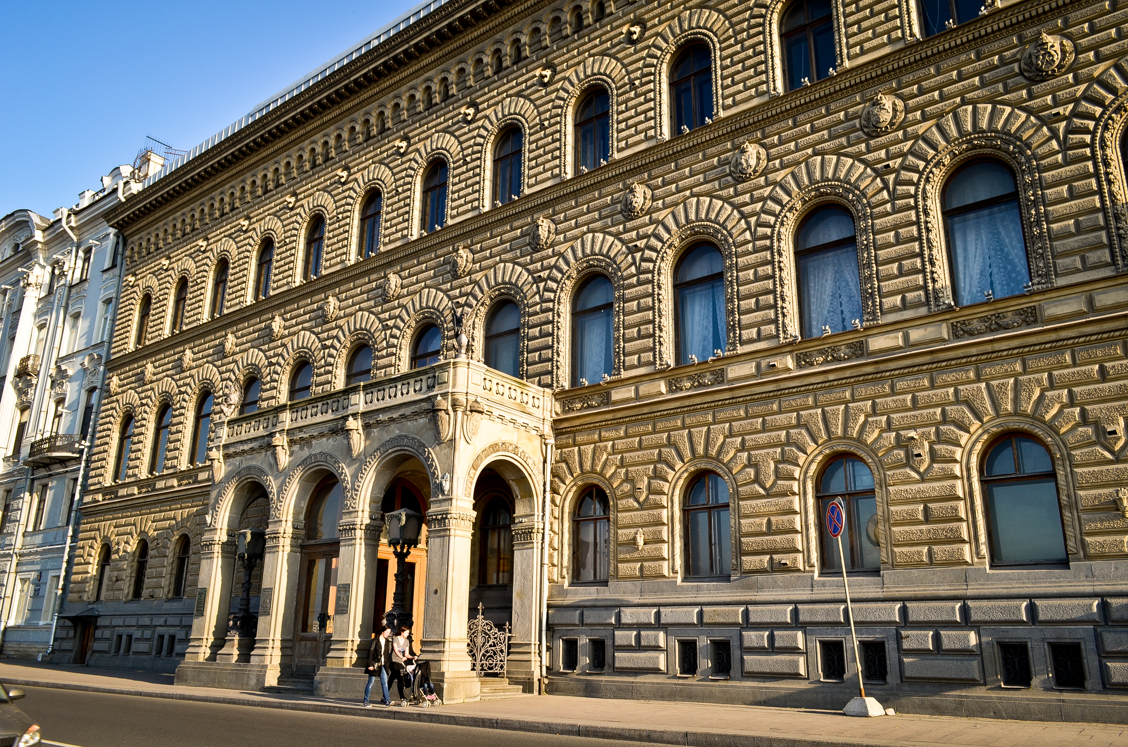 Дворец Великого князя Владимира Александровича (Санкт-Петербург и Лен.область, Санкт-Петербург, Дворцовая наб., 26, Миллионная улица, 27)